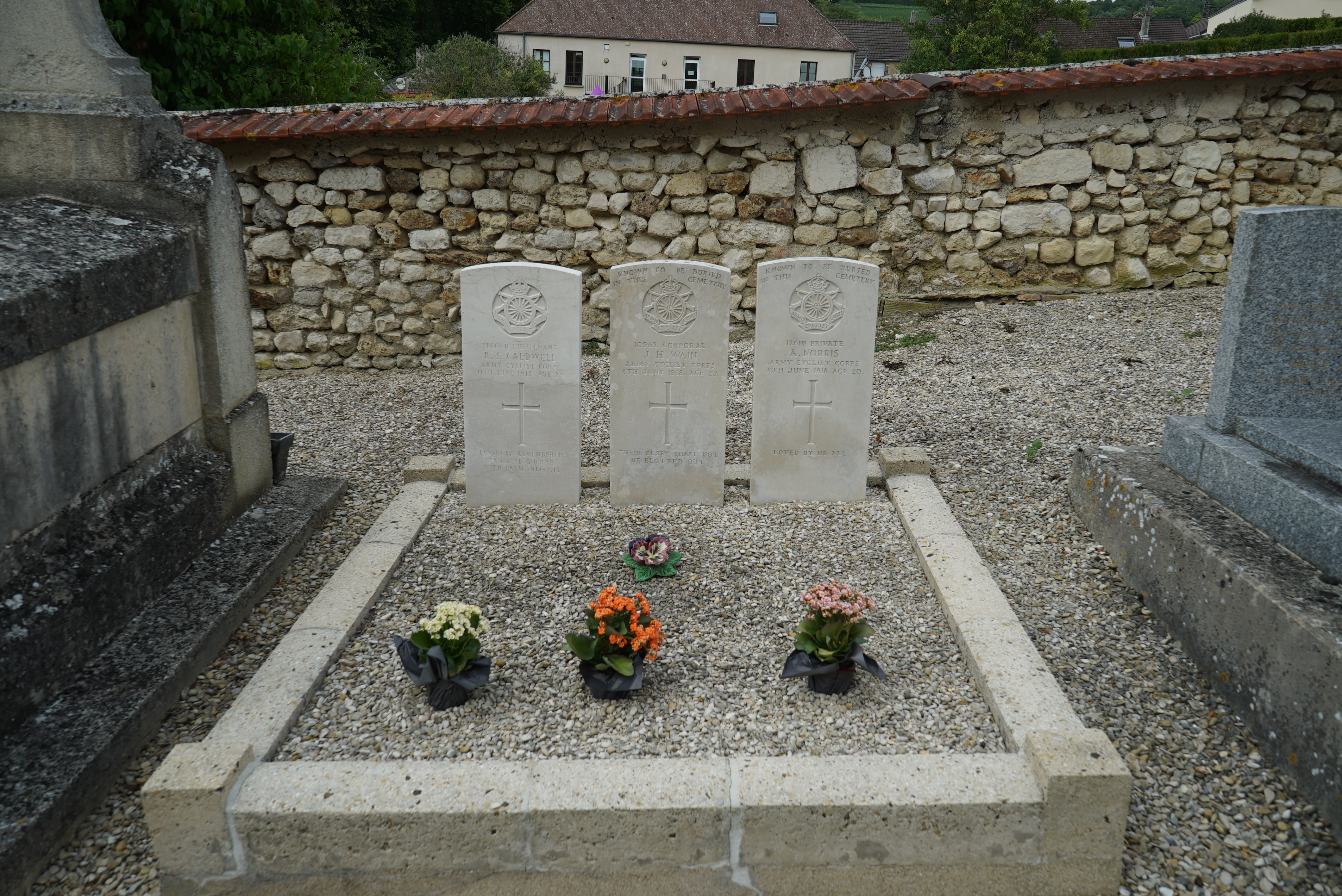 dans le cimetière de l'église.